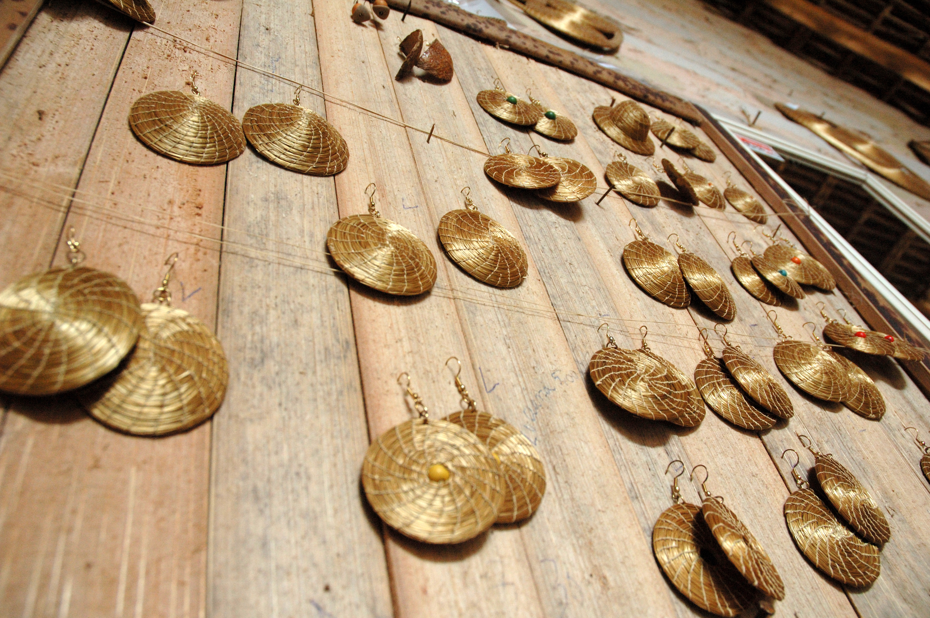 Brincos de Capim Dourado na loja de artesanato do povoado de Mumbuca